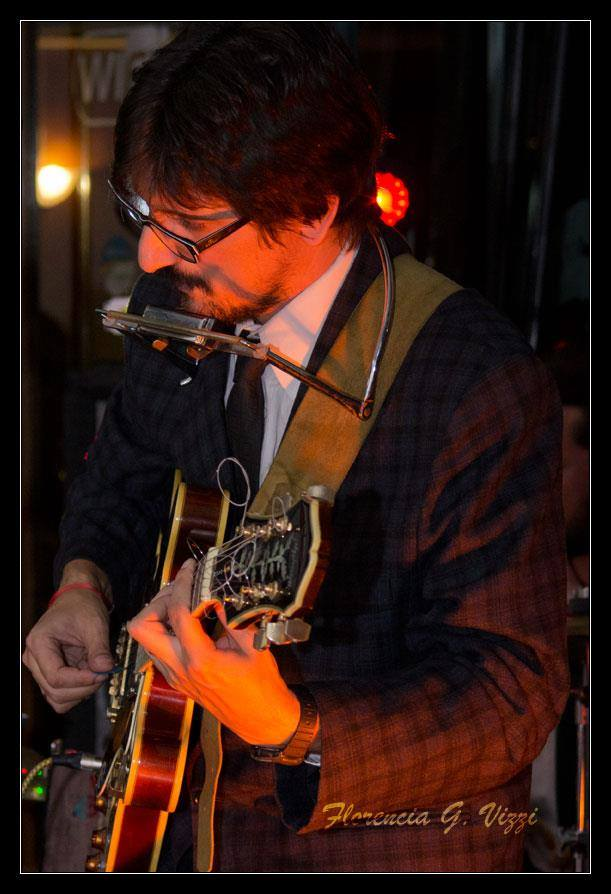 Fotografía en color del músico pergaminense Pablo Read (n. 1977) tocando la guitarra eléctrica y la armónica.